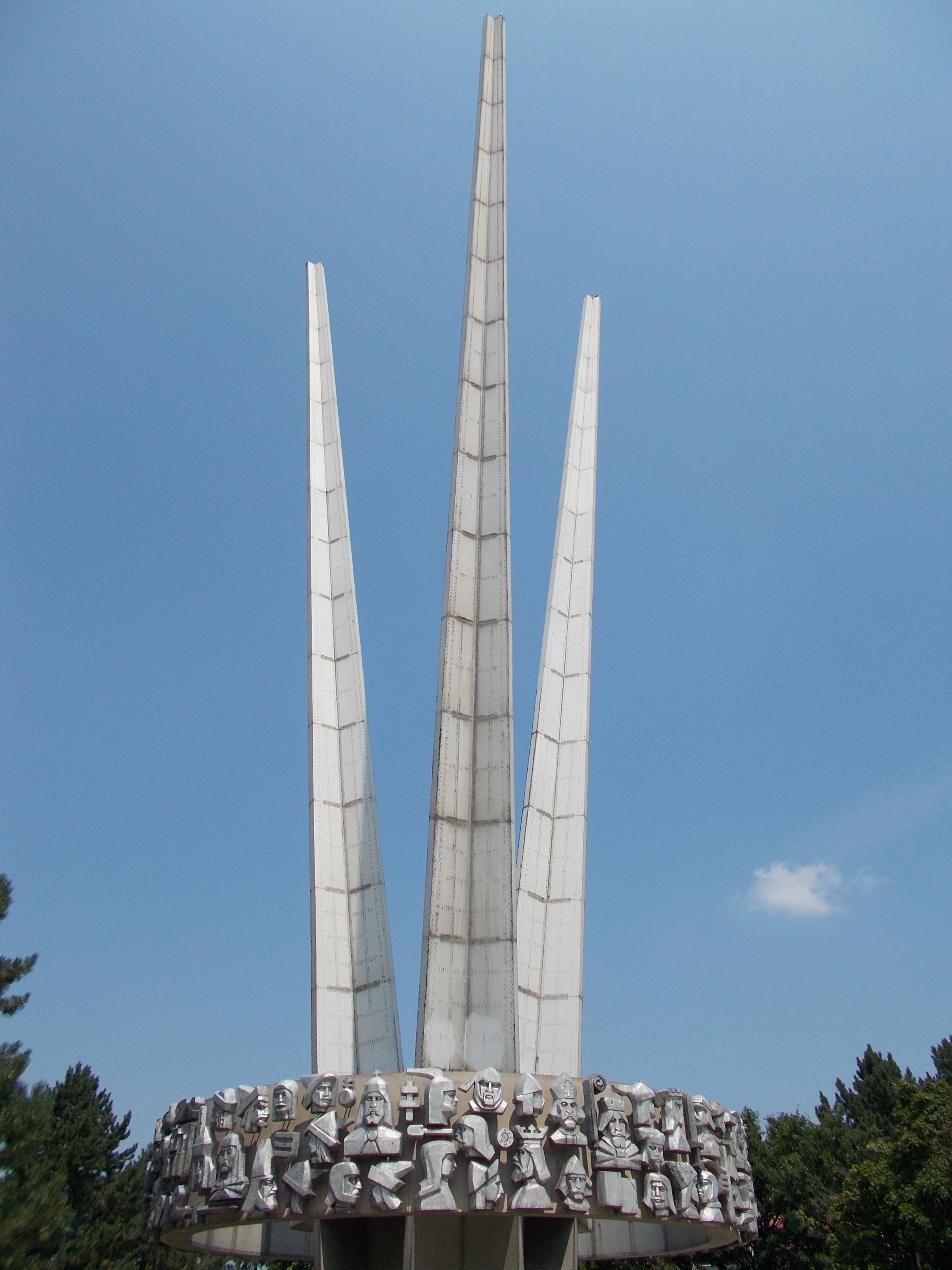 Millenniumi emlékmű. Műemlék ID 793. Alumínium. Dél felől. - Magyarország, Fejér megye, Székesfehérvár, Öreghegy, Uzsoki utca. This is a photo of a monument in Hungary, Identifier: 793